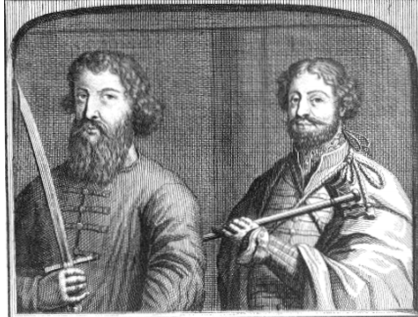 Nicolaes Witsen, "Noord en Oost Tartarye" ("North and East Tartary"), 1705, P. 524. Georgian king Archil II and his son Irakli I.